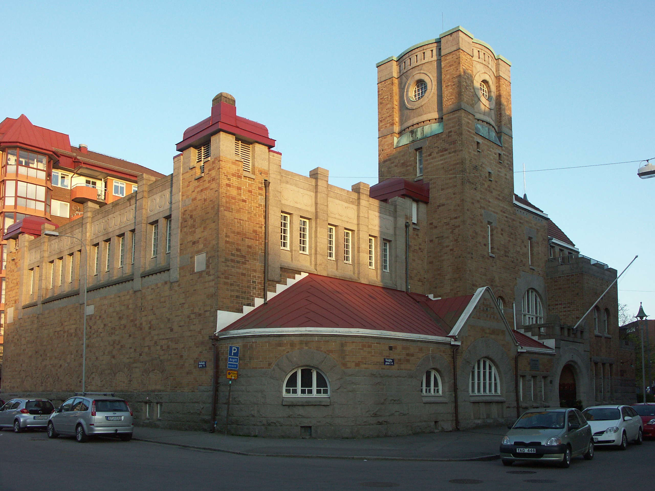 Elyseum, Västgötagatan 2, är ett energihistoriskt museum och Göteborgs Energis gamla huvudkontor, byggnaden ritades av arkitekt Hans Hedlund och togs i bruk 1908 för vad som då hette Göteborgs gas- och elektricitetsverk.